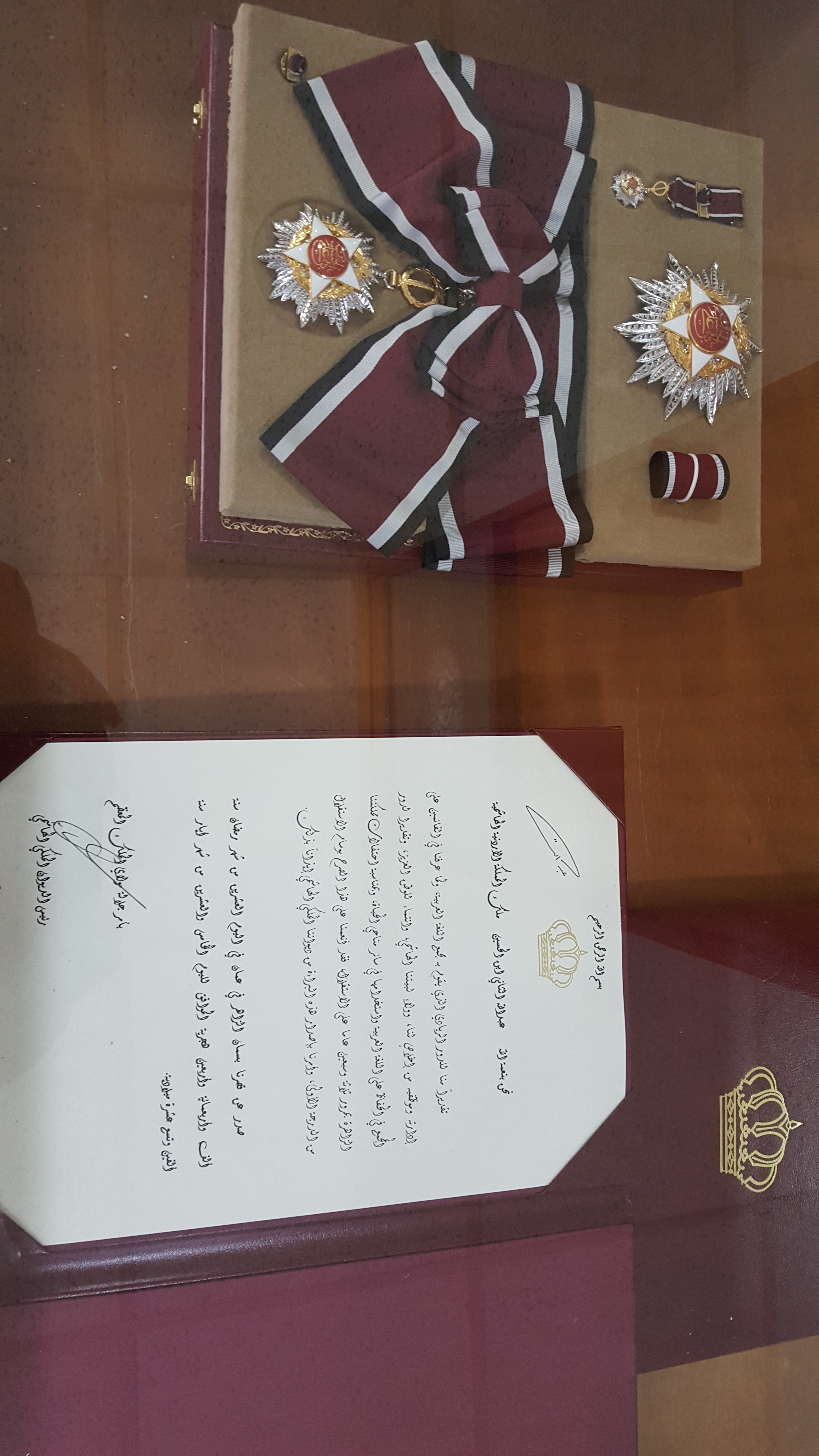 حصول مجمع اللغة العربية الأردني على وسام الاستقلال من الدرجة الأولى